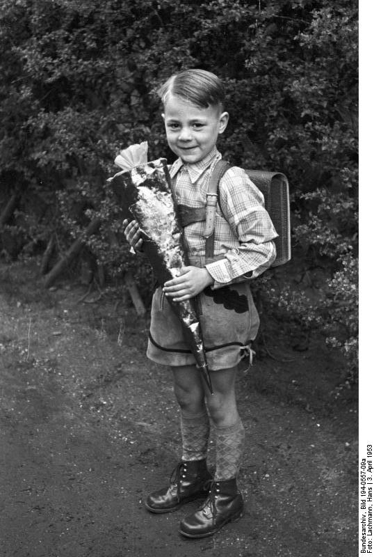 Schulanfänger, Urdenbach, 3. April 1953